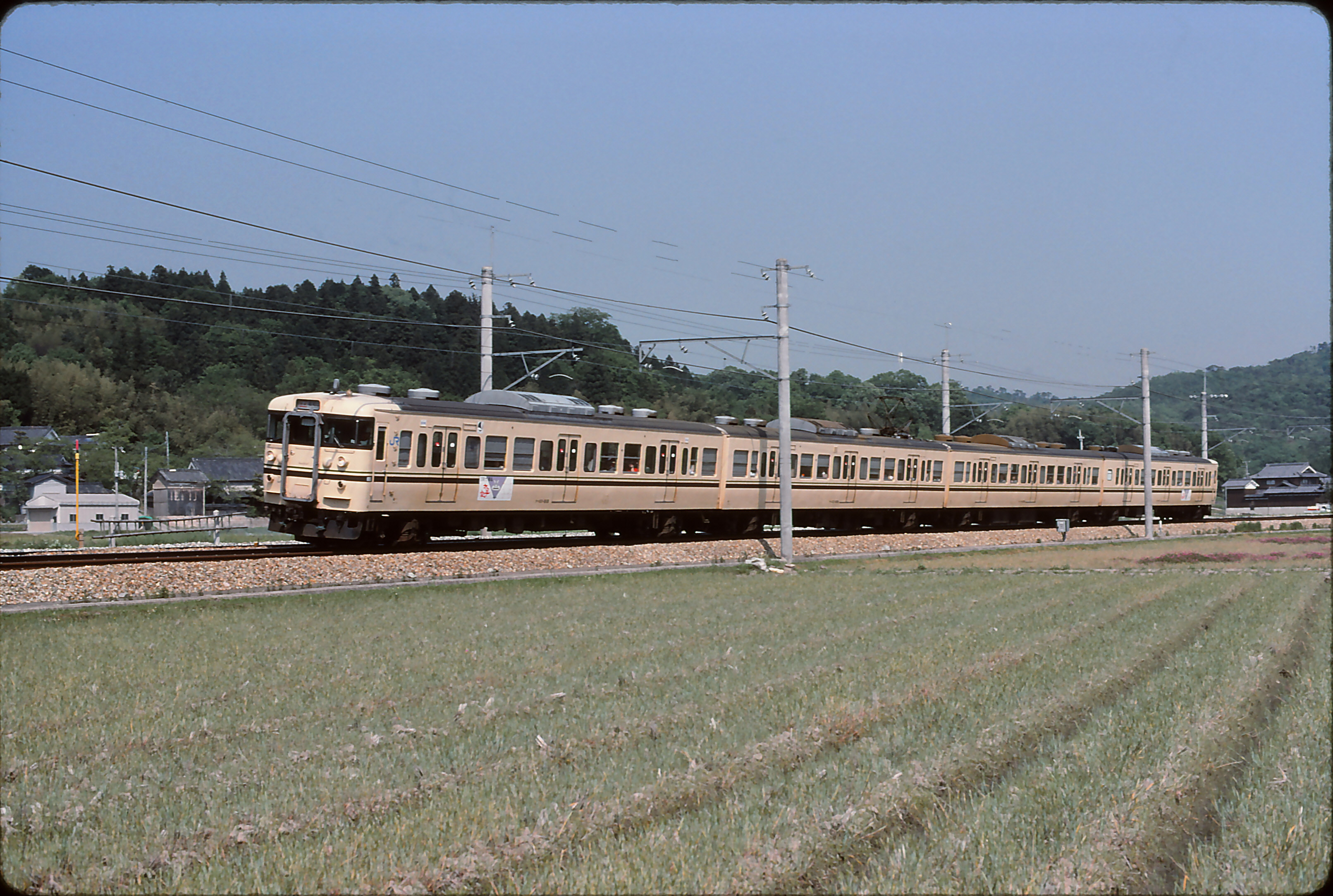 福知山線道場付近